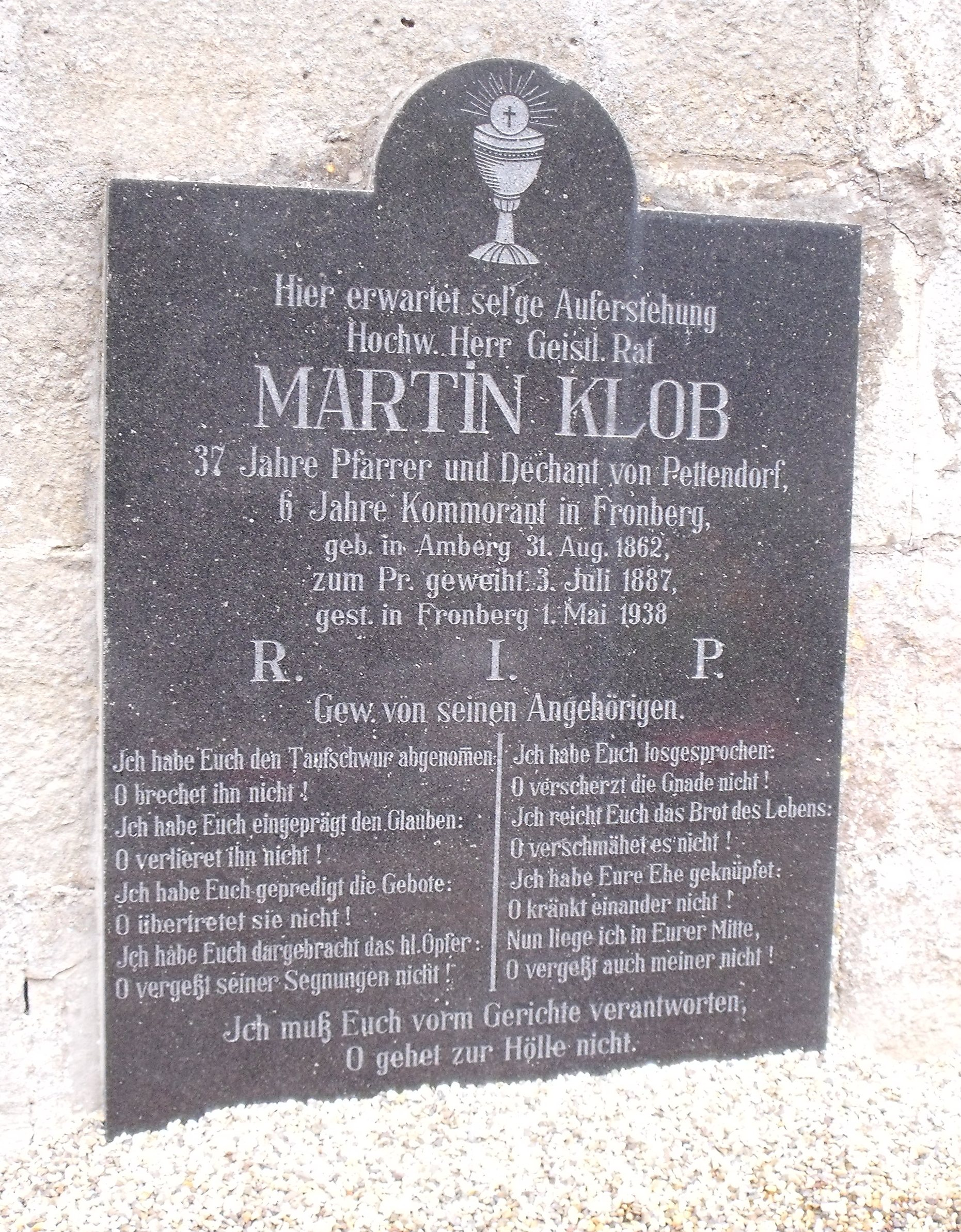 Marmorne Gedenktafel für den Geistlichen Martin Klob an der Dorfkirche St. Anna in Pettendorf.